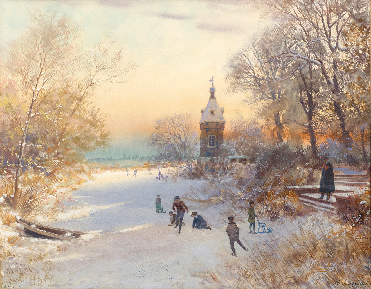 Niederrheinische Winterlandschaft mit spielenden Kindern im Schnee. Gouache auf Papier. Rechts unten signiert und datiert (18)92. 33,5 cm x 43 cm